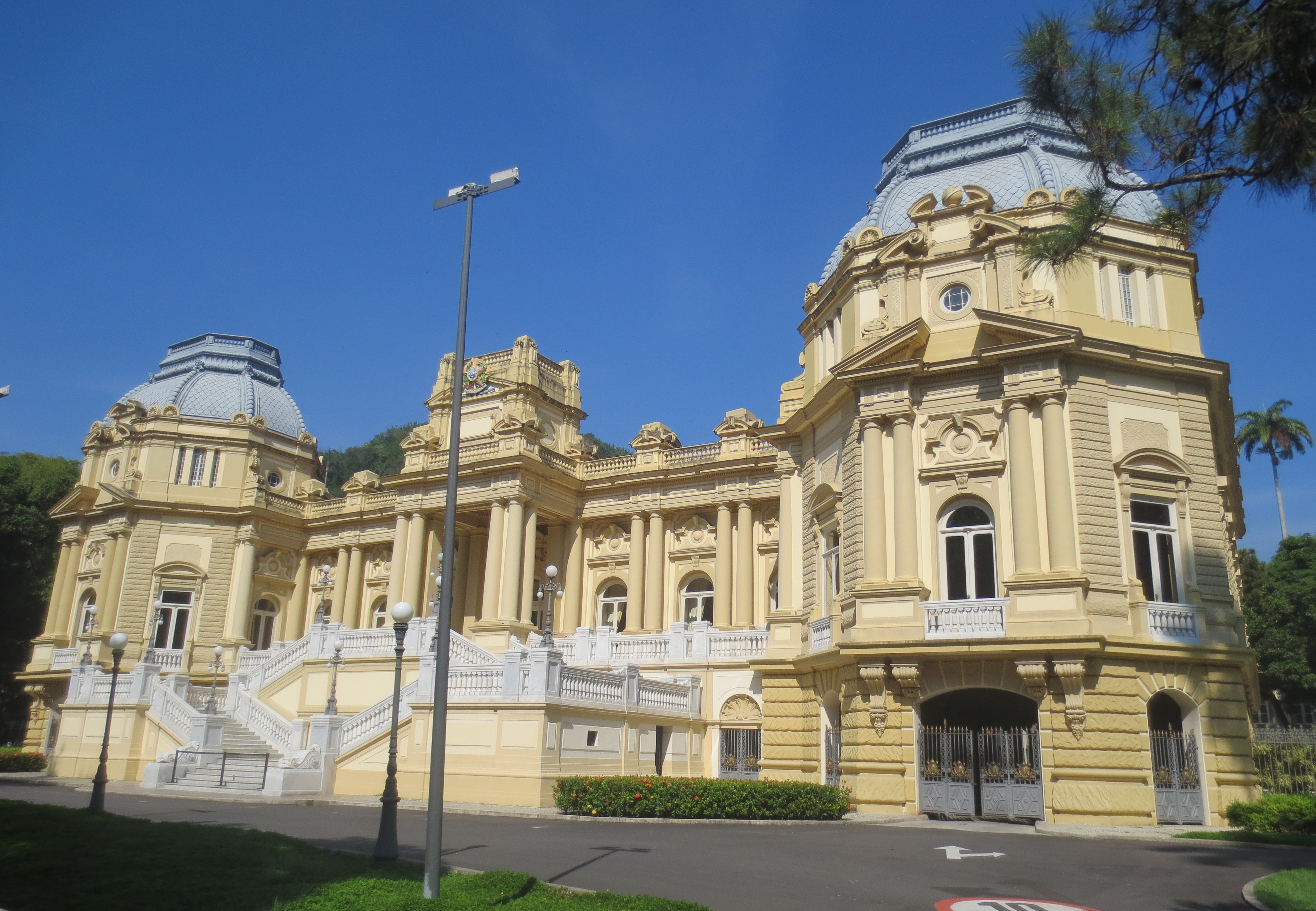 Construído em 1853, como resistência familiar, foi vendido para a família imperial em 1864. A residência foi reformada para abrigar a Princesa Isabel e o Conde D’Eu, passando a ser conhecida como Paço Isabel. Durante a reforma, o casal plantou inúmeras espécies vegetais exóticas, além de uma fileira dupla de palmeiras imperiais na Rua Paissandu, que marcava o caminho do Paço até a praia do Flamengo. Em 1890, o Paço Isabel foi incorporado ao Patrimônio da União e rebatizado como Palácio Guanabara. Em 1908 passou por uma reforma radical que lhe deu o aspecto (eclético) atual. Foi repartição militar, morada de Presidentes da República, abrigou o gabinete do Prefeito do Rio e, em 1960, passou a ser sede do Governo do Estado.